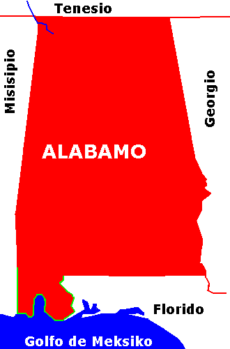 "Patotenilo" Alabamo